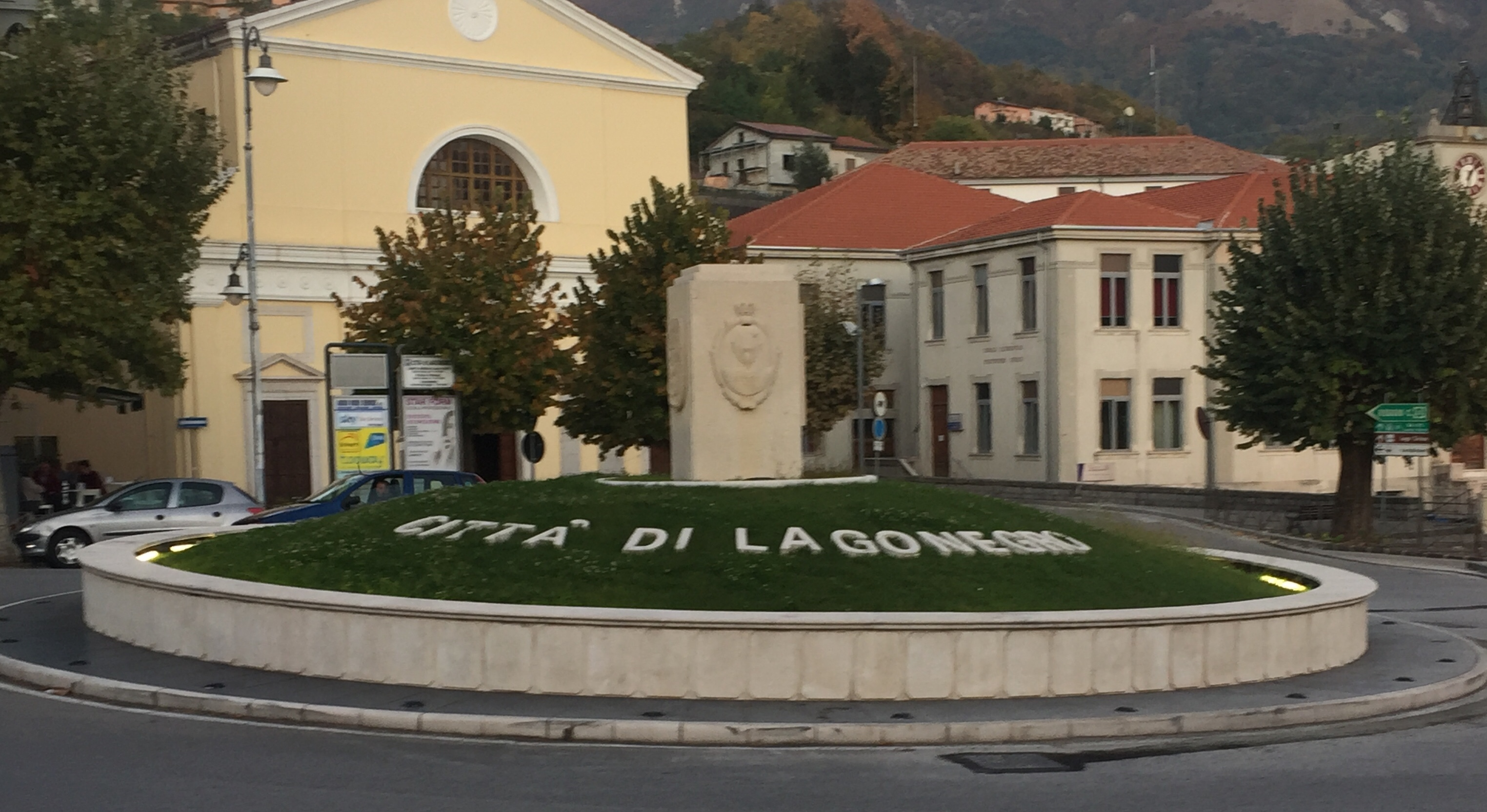 Rotonda Monumentate città di Lagonegro